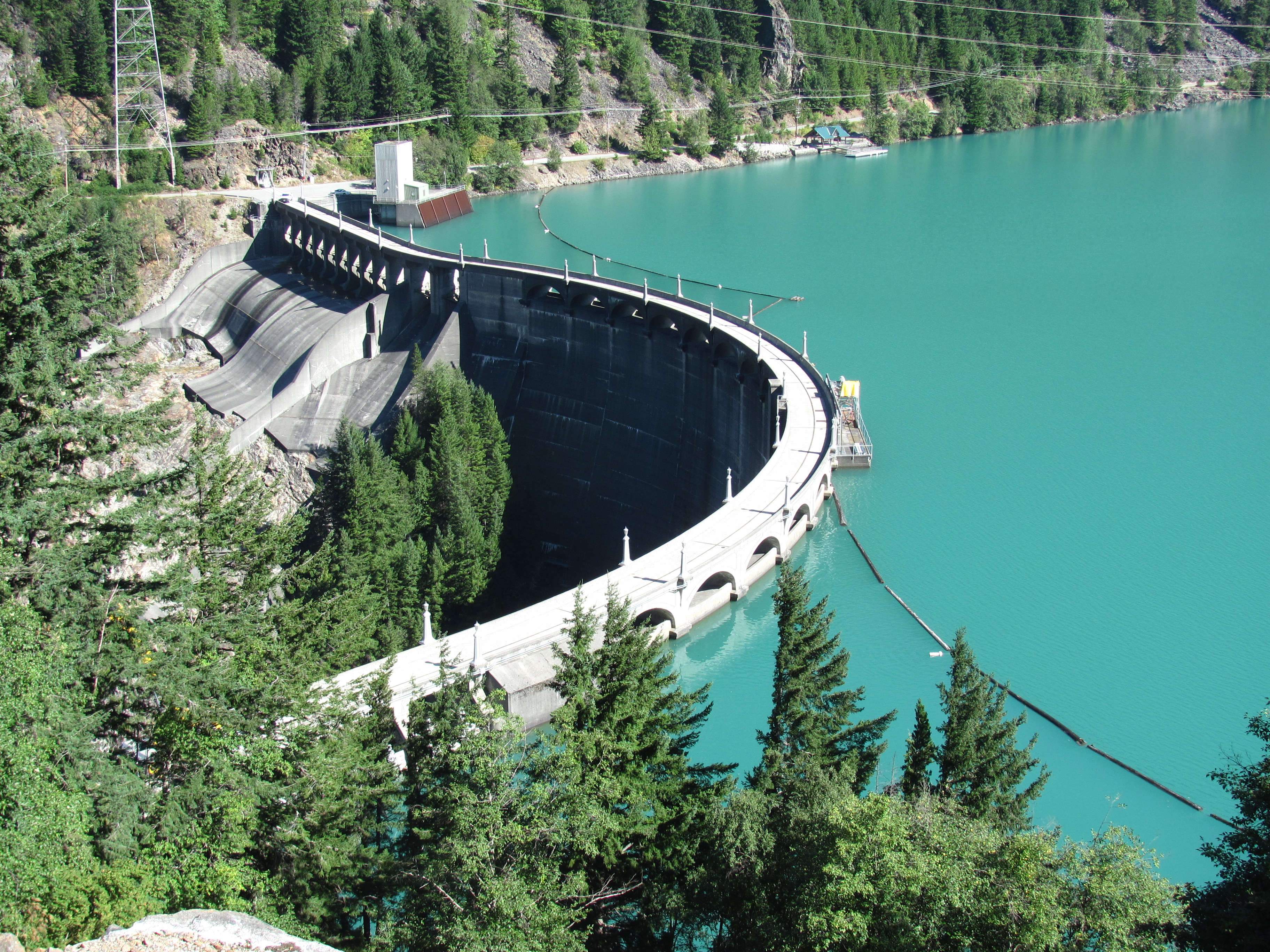 emerald